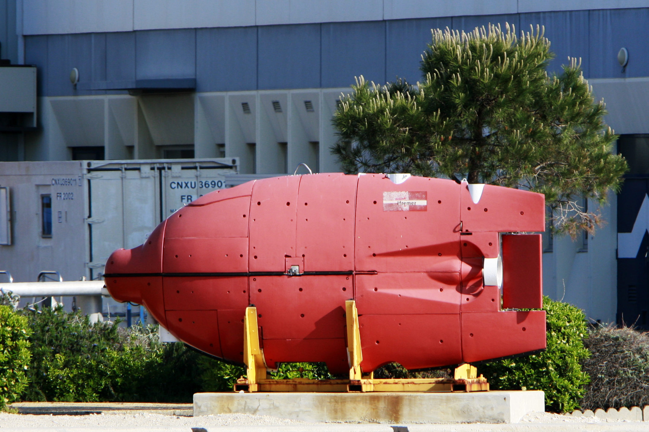 Ifremer Épaulard AUV in La Seyne-sur-Mer harbour, France